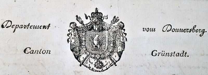 Kanton Grünstadt Briefkopf 1812 (von altem Dokument im Museum Grünstadt)